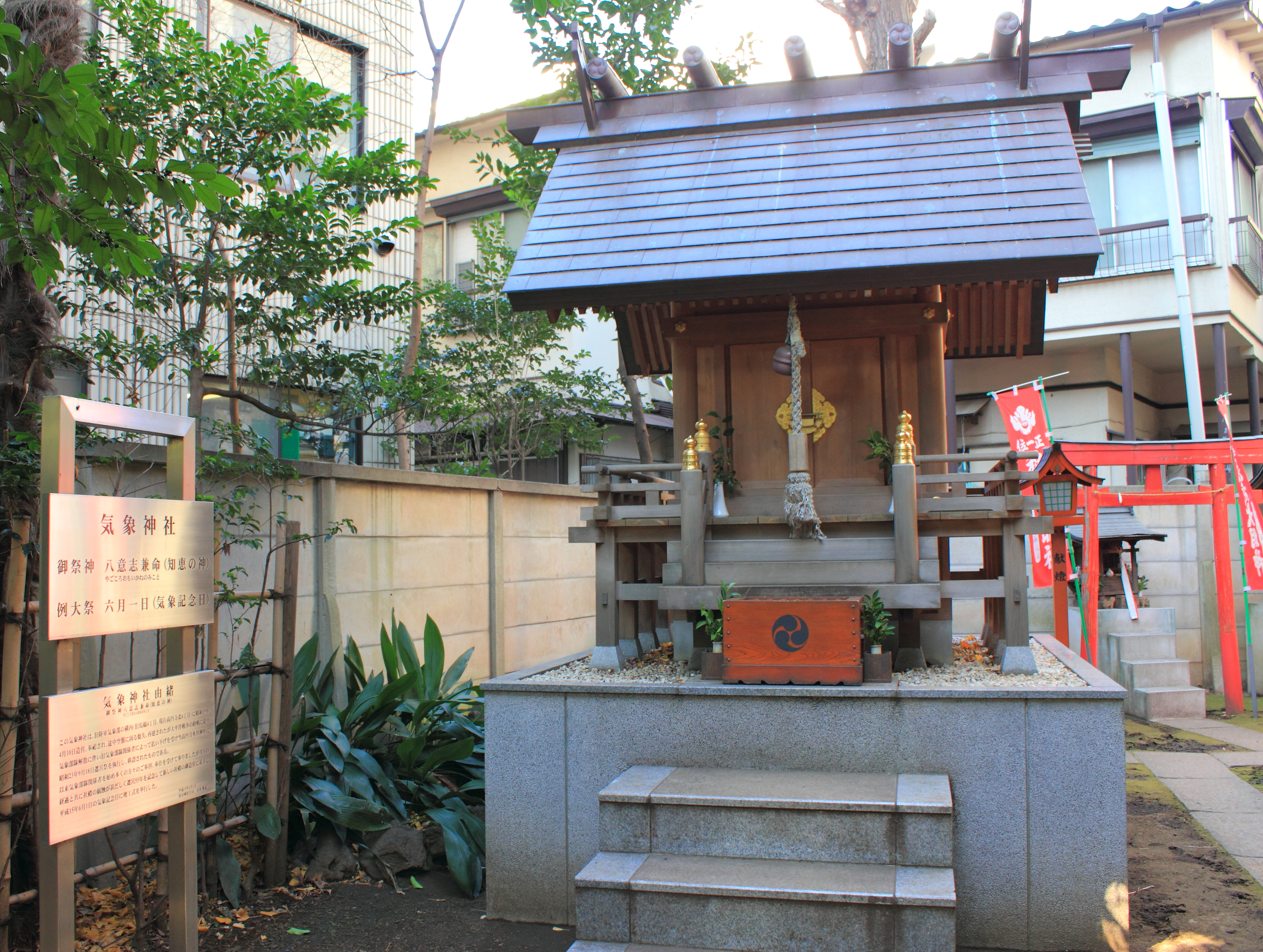 氷川神社（東京都杉並区高円寺南）内の気象神社